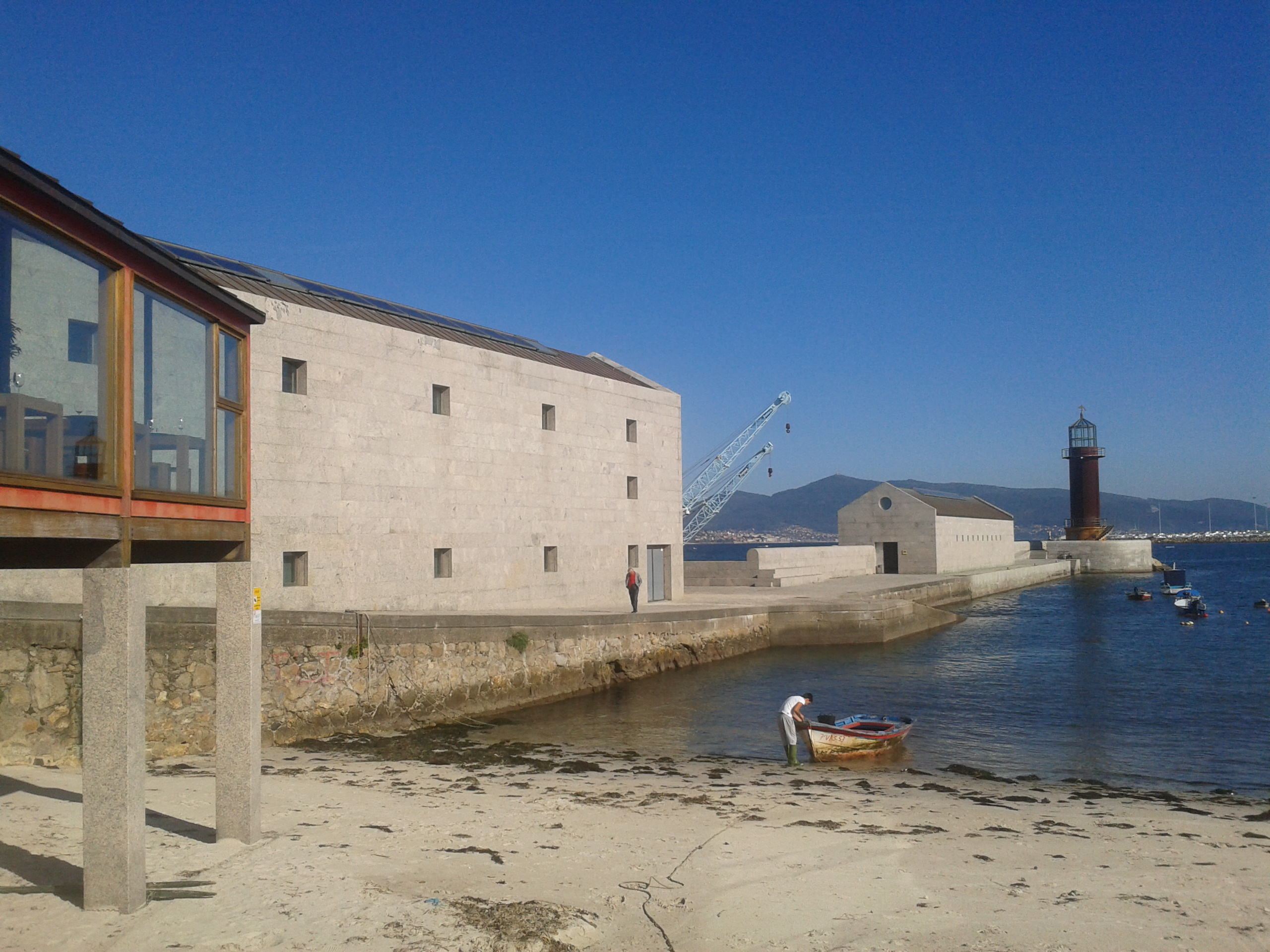 museo do mar de galiza